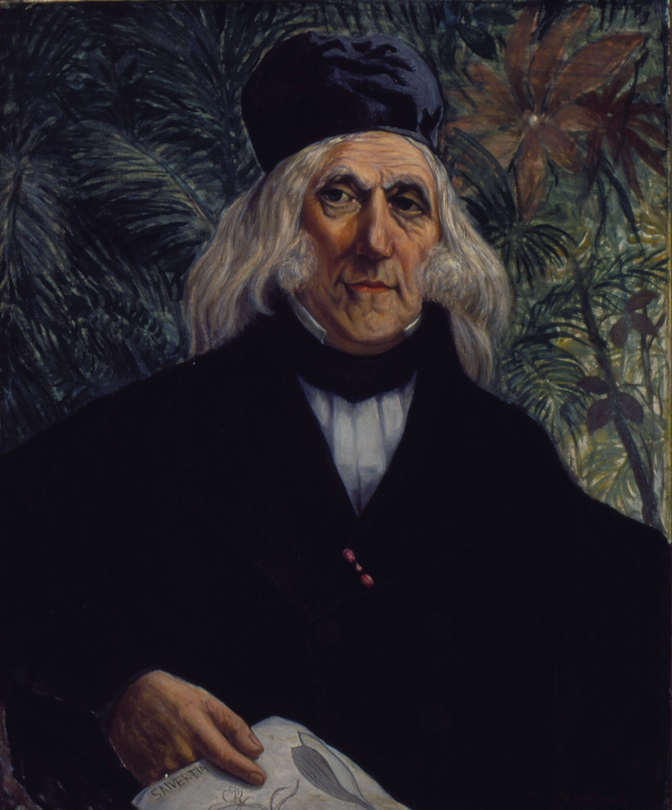 Obra que integra o acervo do Museu Paulista da USP. Coleção Fundo Museu Paulista - FMP